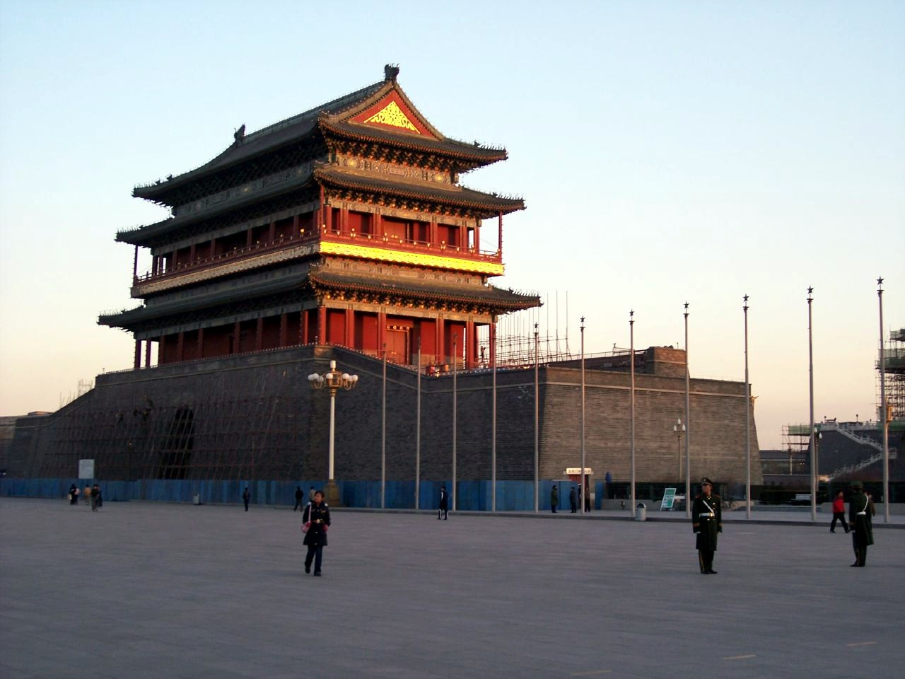 北京城楼